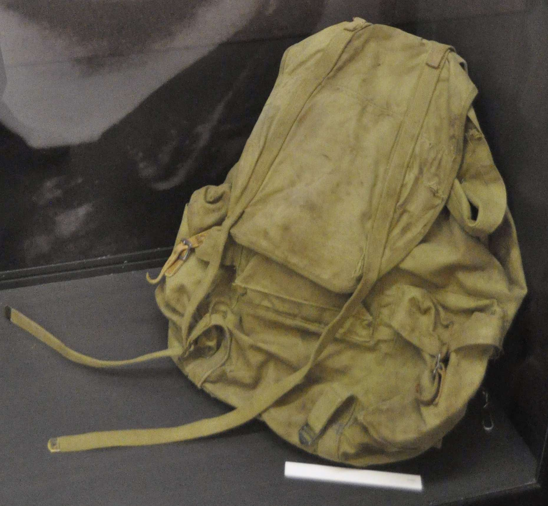 Détail du sac de voyage de Jack Kerouac. Exposition "Sur la route deJack Kerouac : L'épopée, de l'écrit à l'écran" (16 mai - 19 août 2012) au Musée des lettres et manuscrits de Paris.